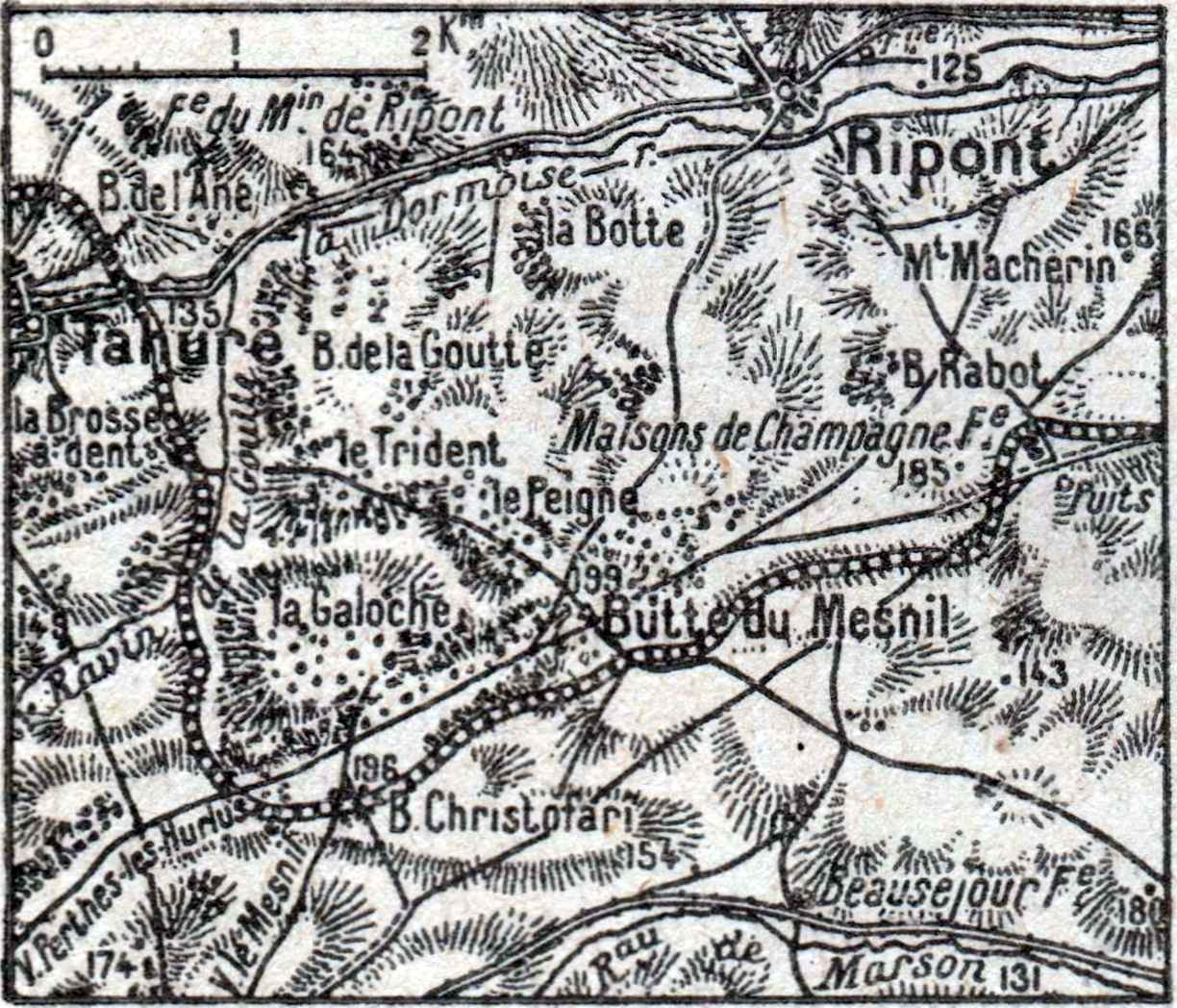 Scan of L'ILLUSTRATION No 3912. Le saillant allemand entre Tahure et la Butte du Mesnil.